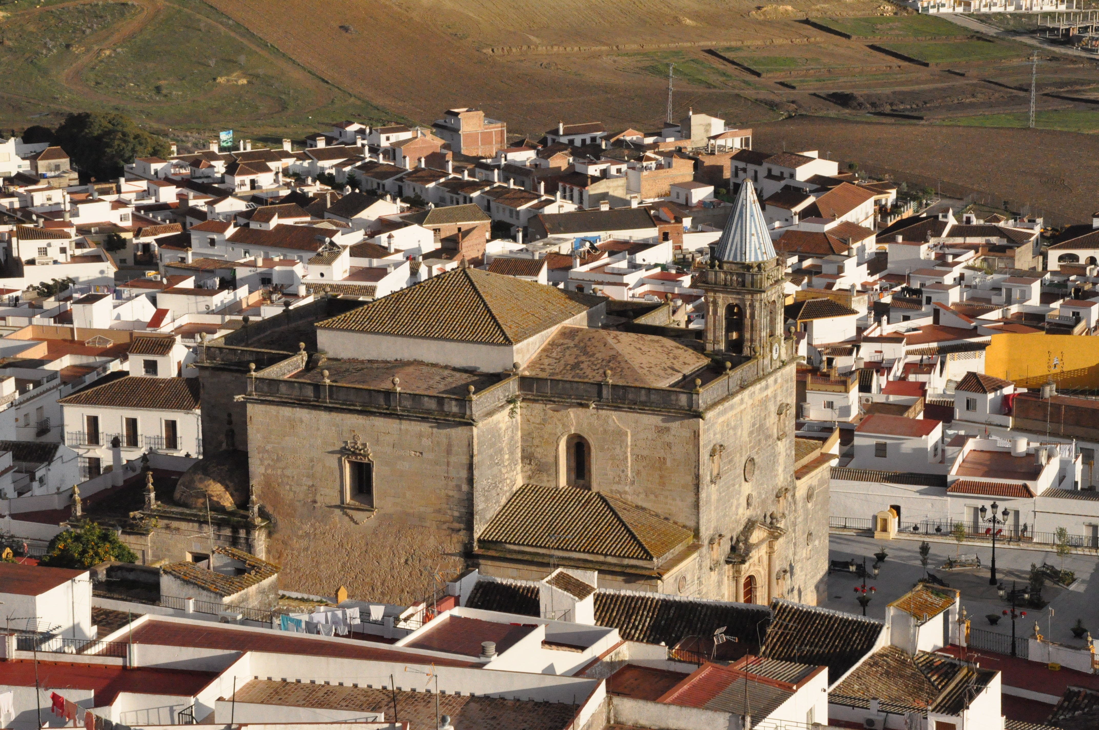 Espera-dsc 0239.jpg